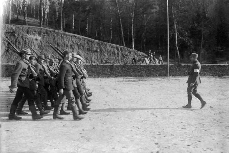 Bewaffnete bayrische Kampfverbände der Truppe "Hitler" an der Thüringschen Grenze. Ausbildung der neuen Rekruten auf einem Gelände in Neustadt.